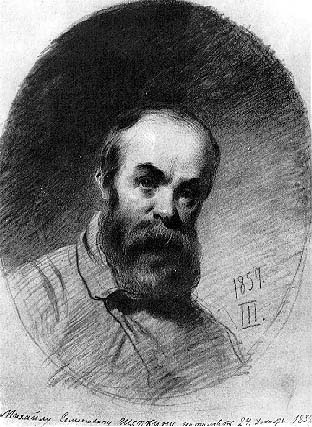 Gift aan Mykhailo Shchepkin, acteur, die Taras Shevchenko bezocht in Nizhniy Novgorod (Gorky). Taras Shevchenko was net uit zijn exil terug gekomen. Potlood tekening op papier, 28-11-1857.